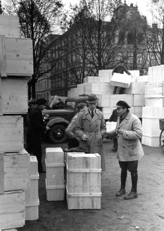 Riga, Umsiedlung Baltendeutscher Riga, Baltenumsiedlung: Berge von Kisten für die balt. Rückwanderer auf dem Unionsplatz Quelle Mauritius (Geiges) 1939 [Riga.- Beladen von Lastwagen mit Kisten baltendeutscher Umsiedler.]